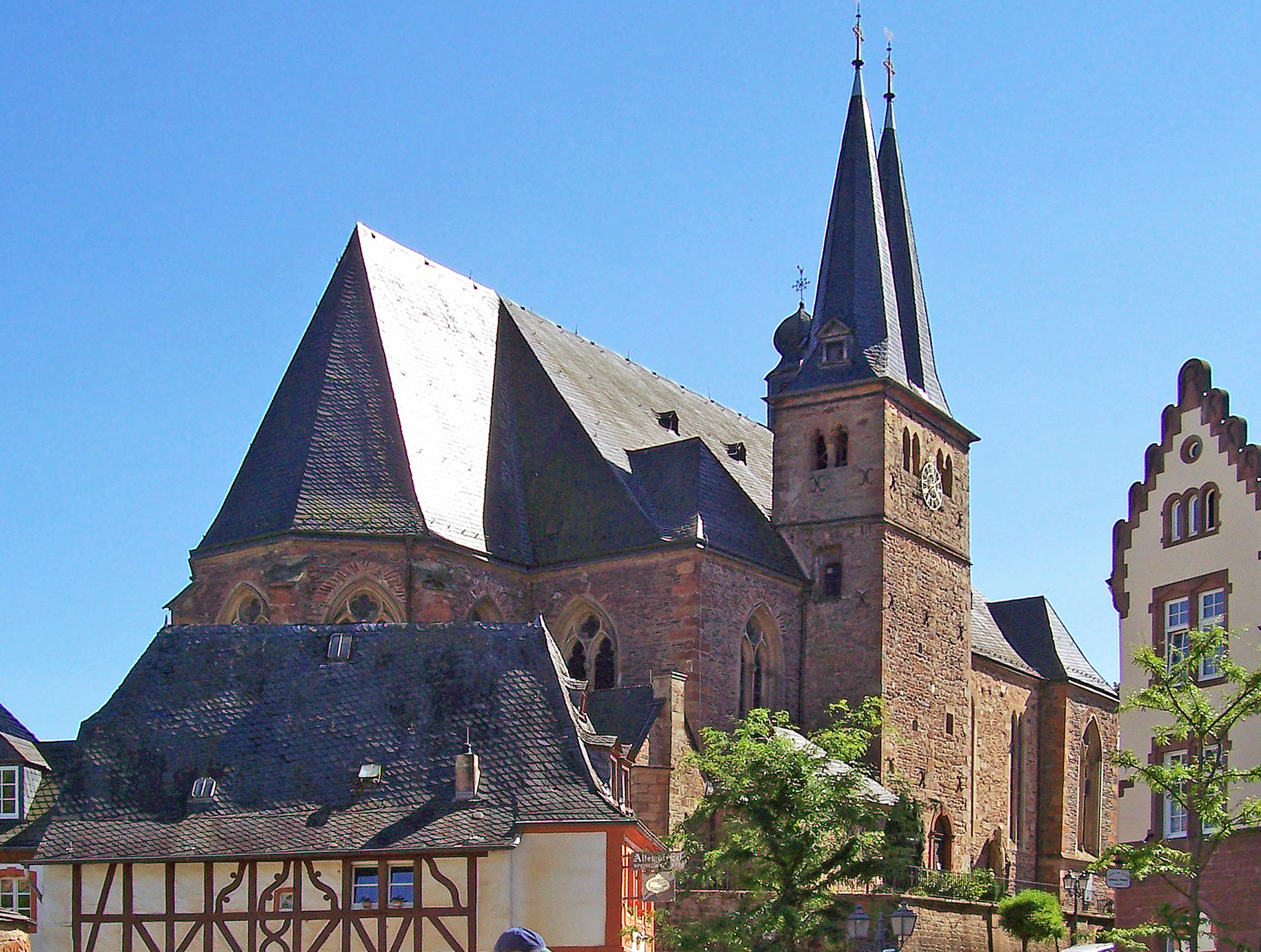 Die katholische Pfarrkirche St. Laurentius in Saarburg, Rheinland-Pfalz